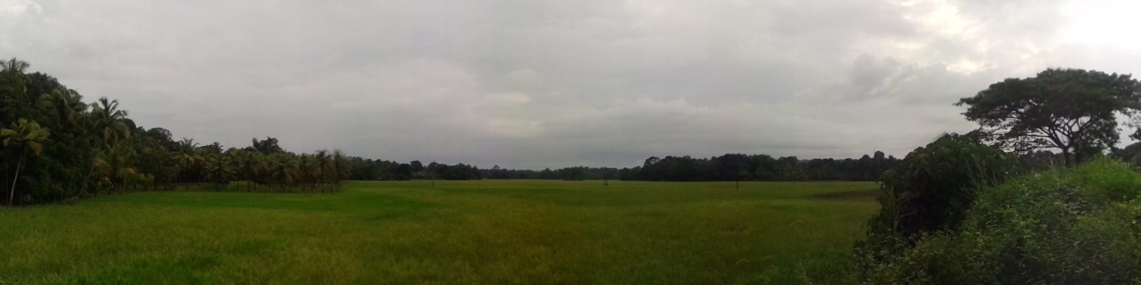 മാമ്പ്ര ചെറിയനാട് നെല്‍ കൃഷി